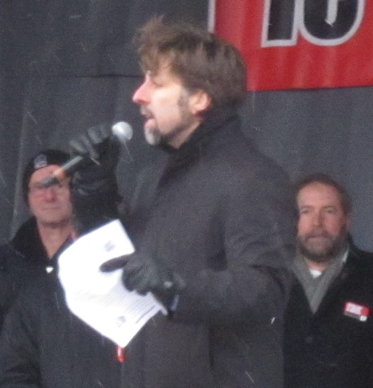 Luc Ferrandez lors de la manifestation en appui des lock-outés du Journal de Montréal.